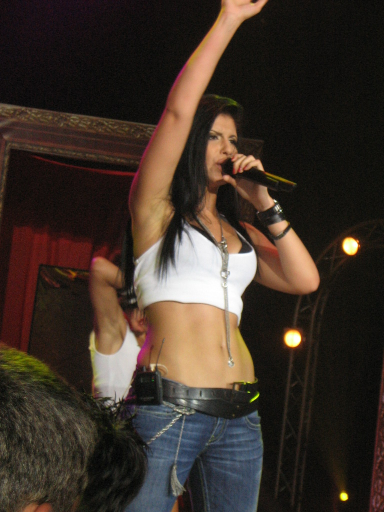 Анелия на концерта "Добра среща, приятели"